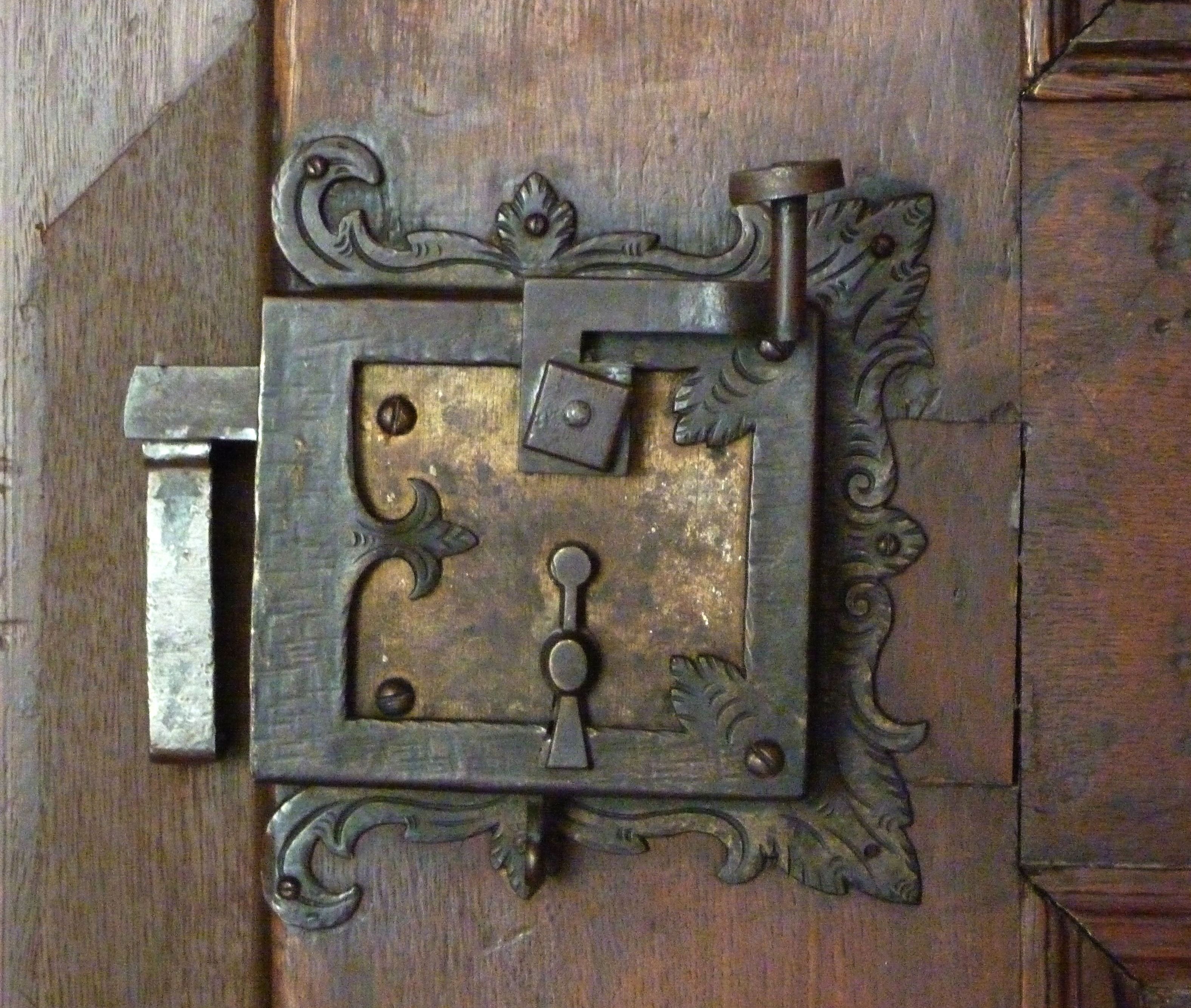 Ulm - Patrizierhaus Ehinger, altes Türschloss